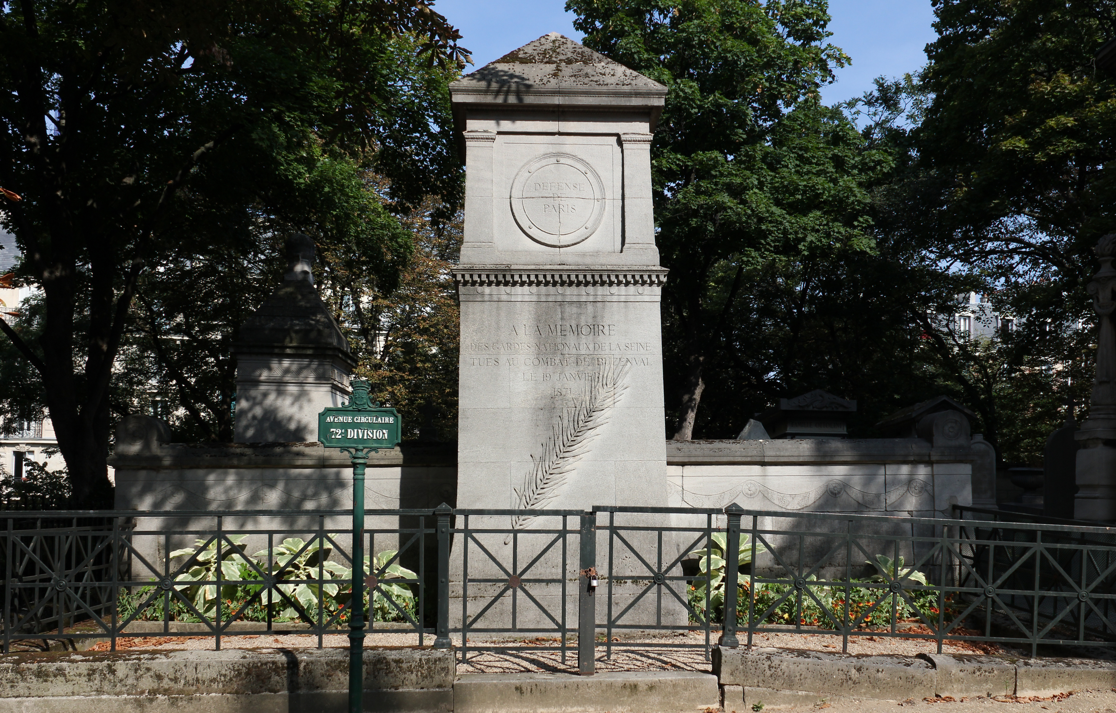 Monument aux morts lors du siège de Paris, Cimetière du Père-Lachaise à Paris.